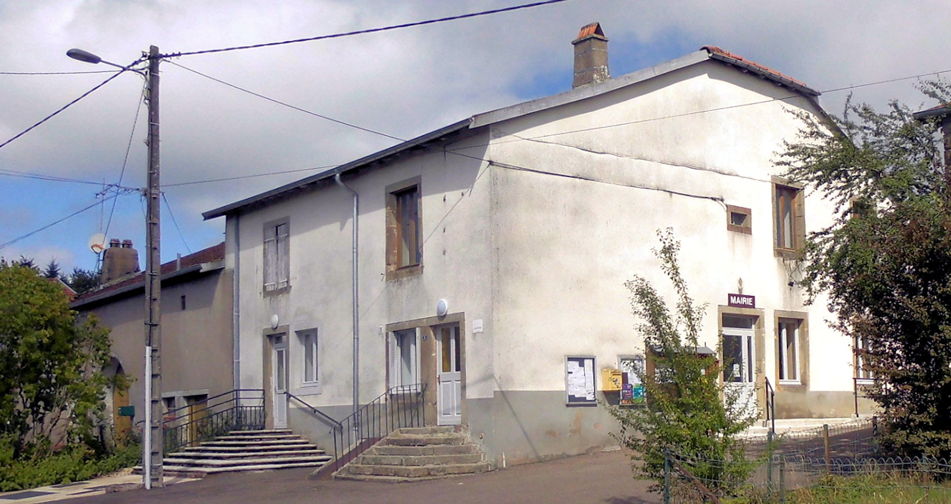 La mairie de Pont-du-Bois